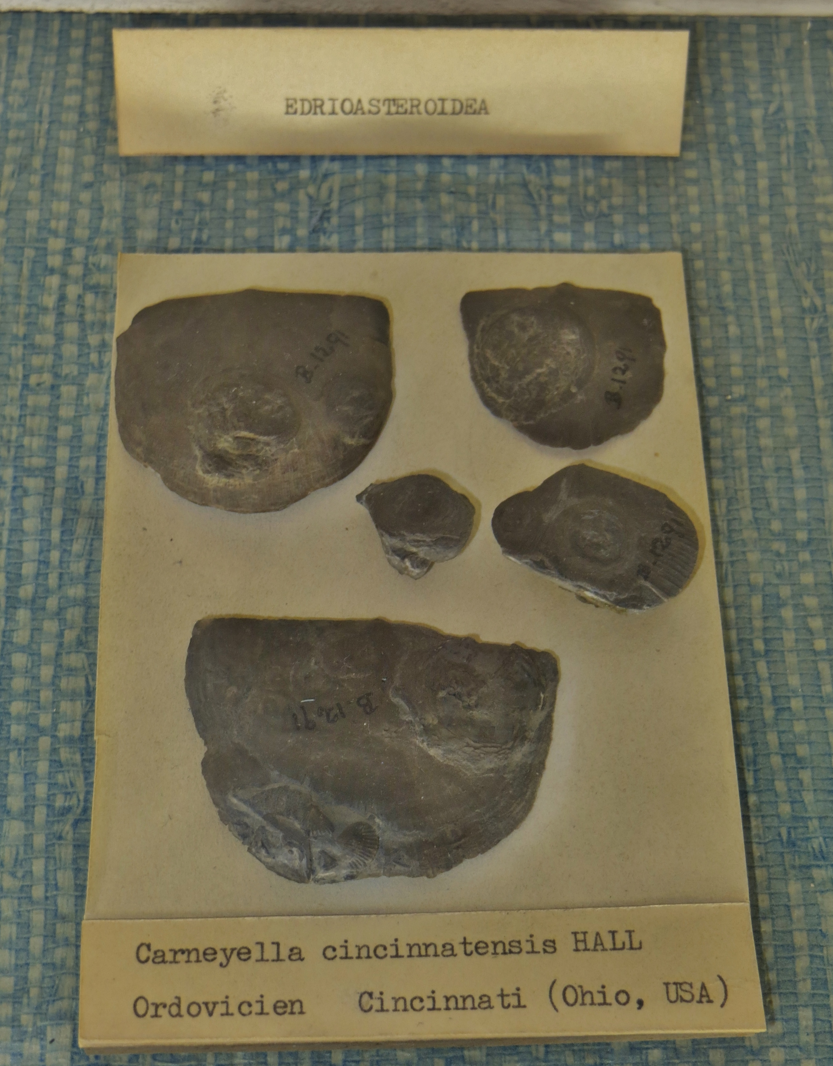 Fossiles d'Edrioasteroidea (échinodermes primitifs, MNHN).